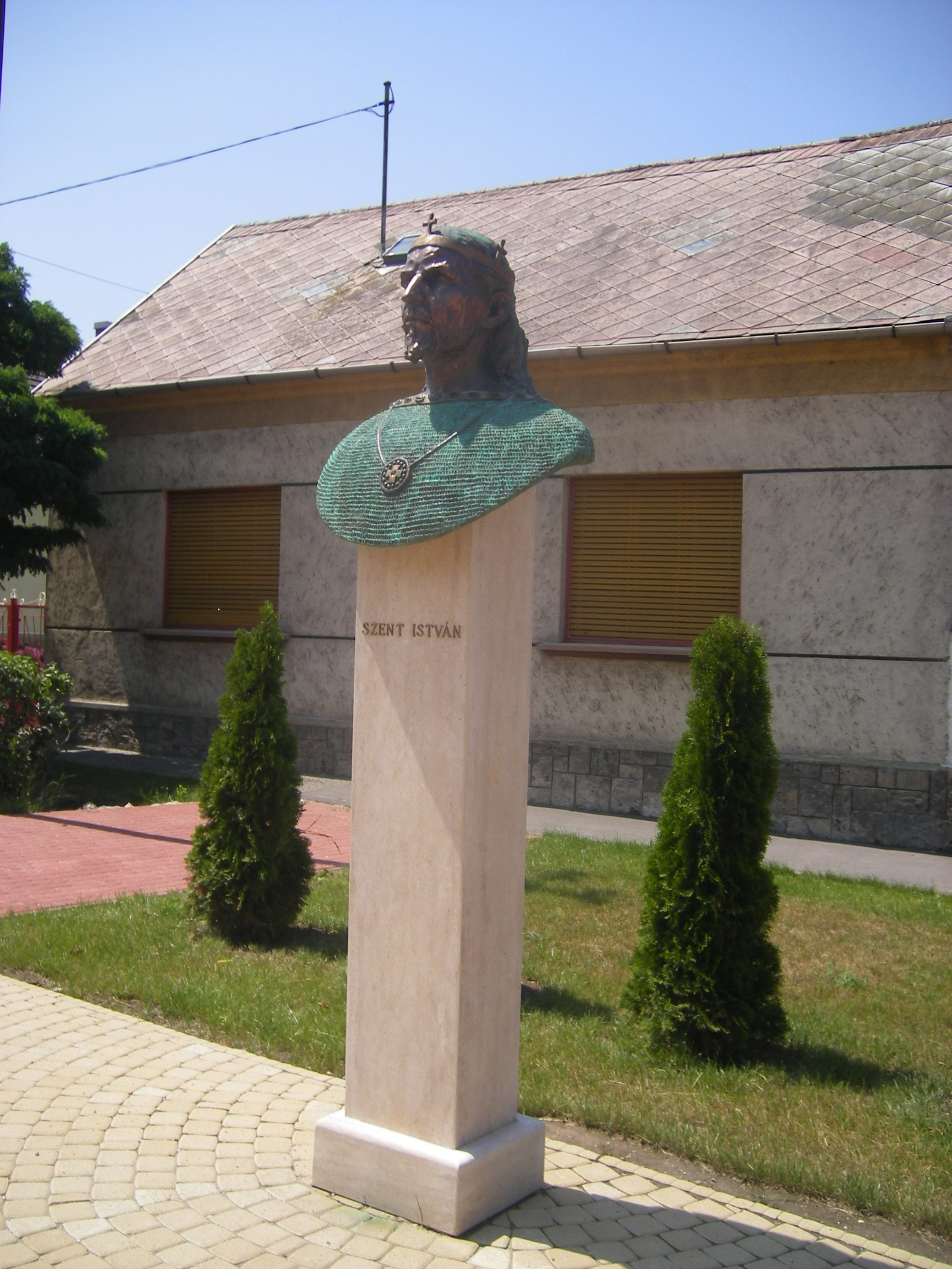 Felsőgalla - Szent István szobor